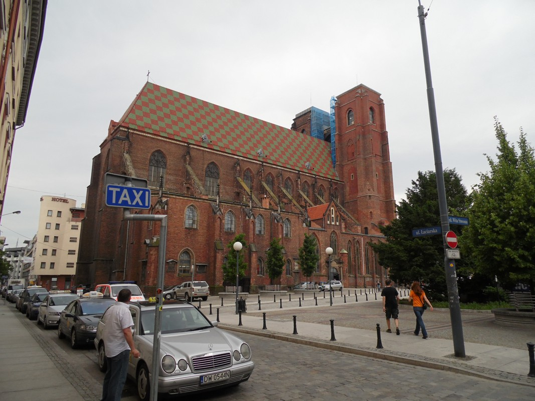 KATEDRA W REMONCIE.